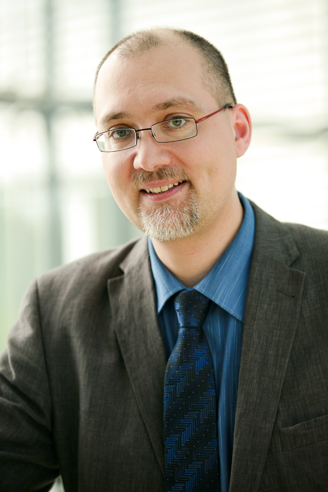 RNDr. Martin Bunček, Ph.D. - místopředseda